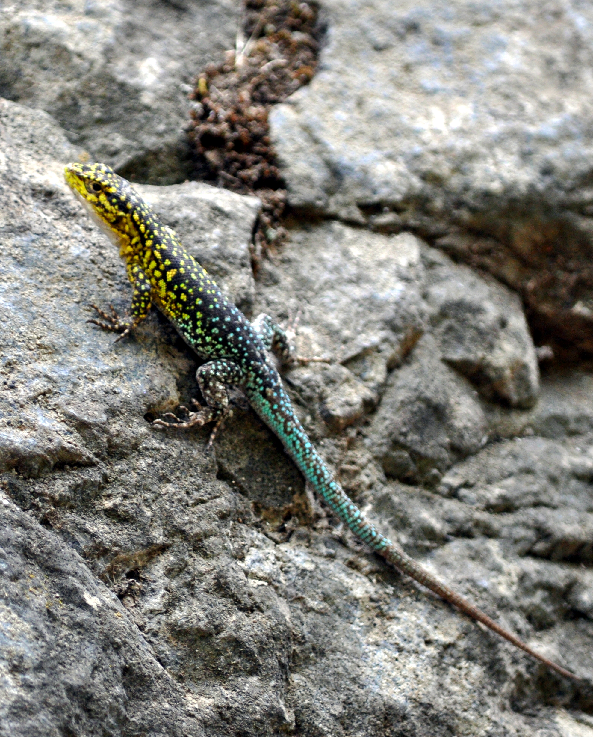 Liolaemus tenuis en el Parque nacional La Campana, Región de Valparaíso, Chile.